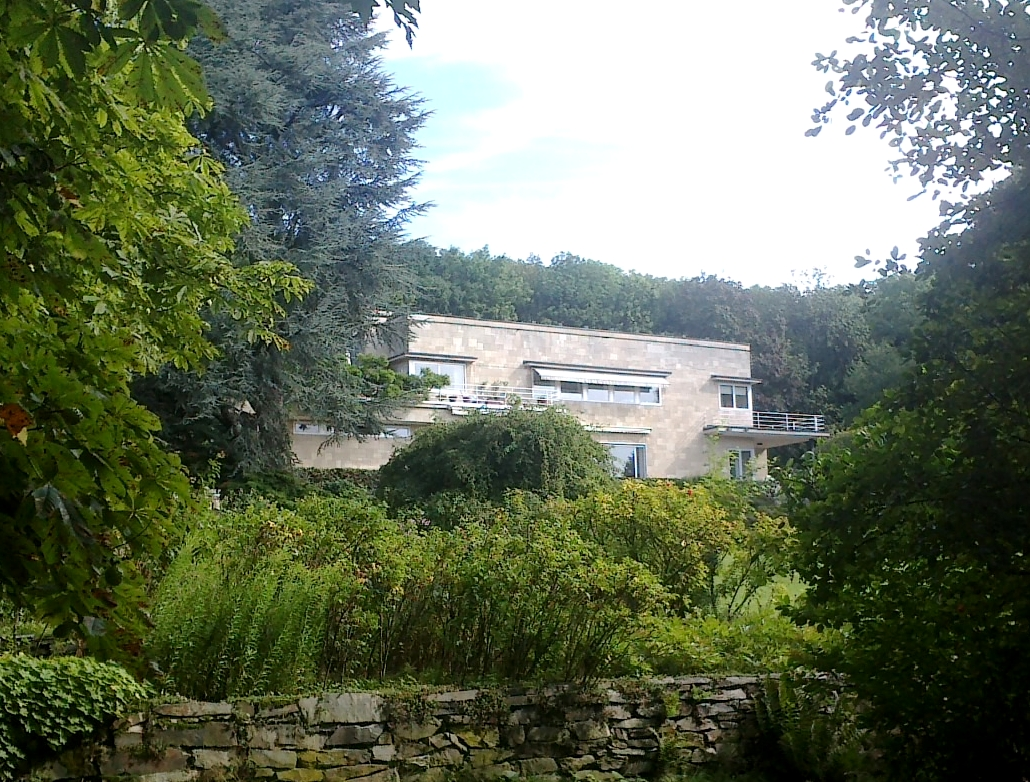 Villa Gans in Kronberg, Falkensteinerstraße, von der Talseite aus fotografiert. Architekt 1928 Peter Behrens, Bauherrin Clara Gans (1881-1957)